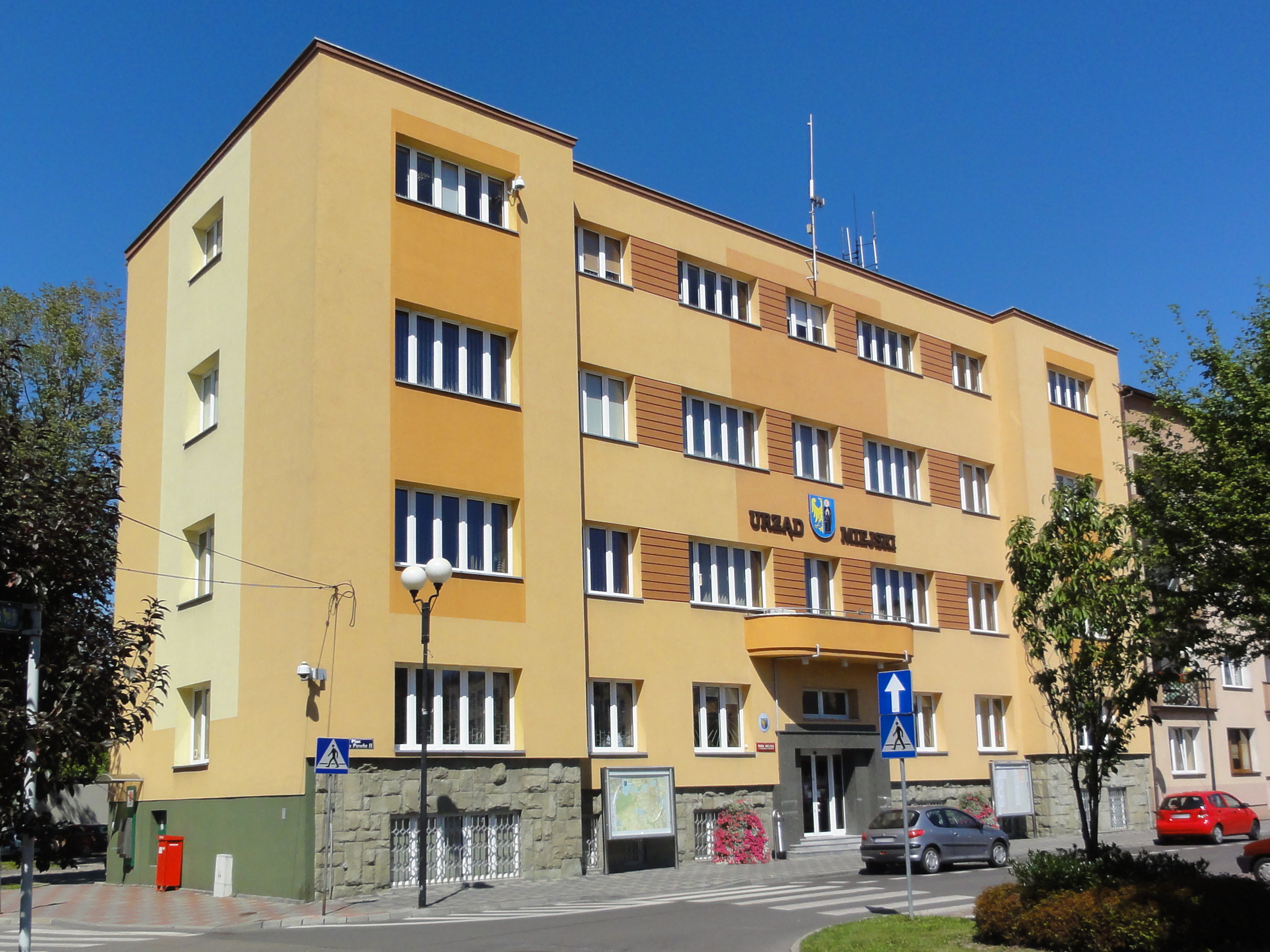 Urząd Miejski, Rada Miejska, Urząd Stanu Cywilnego w Czechowicach-Dziedzicach